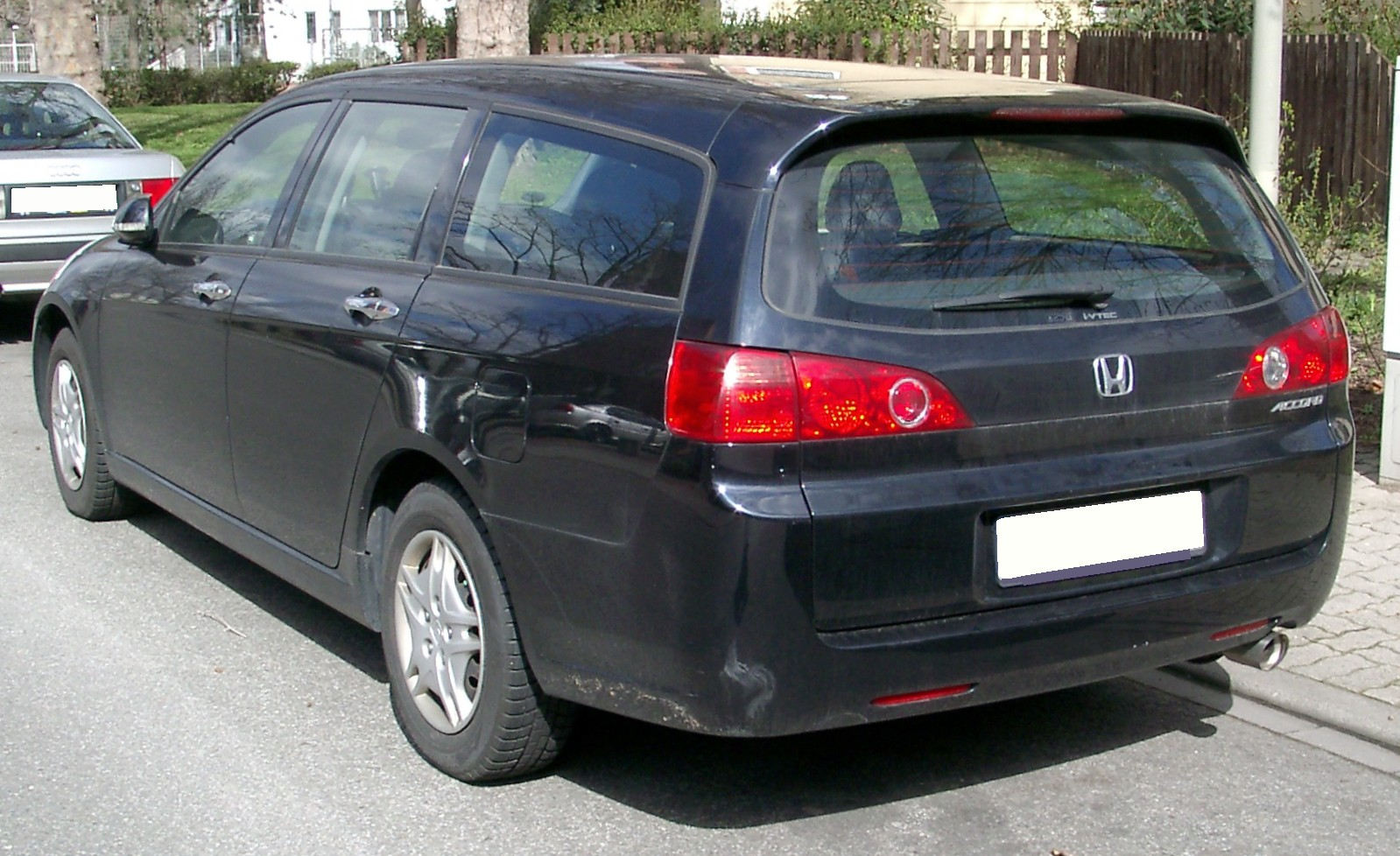 Honda Accord Tourer, 7. Generation